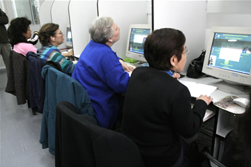 Salas de internet de la Bibliotece Municipal de Jesús María